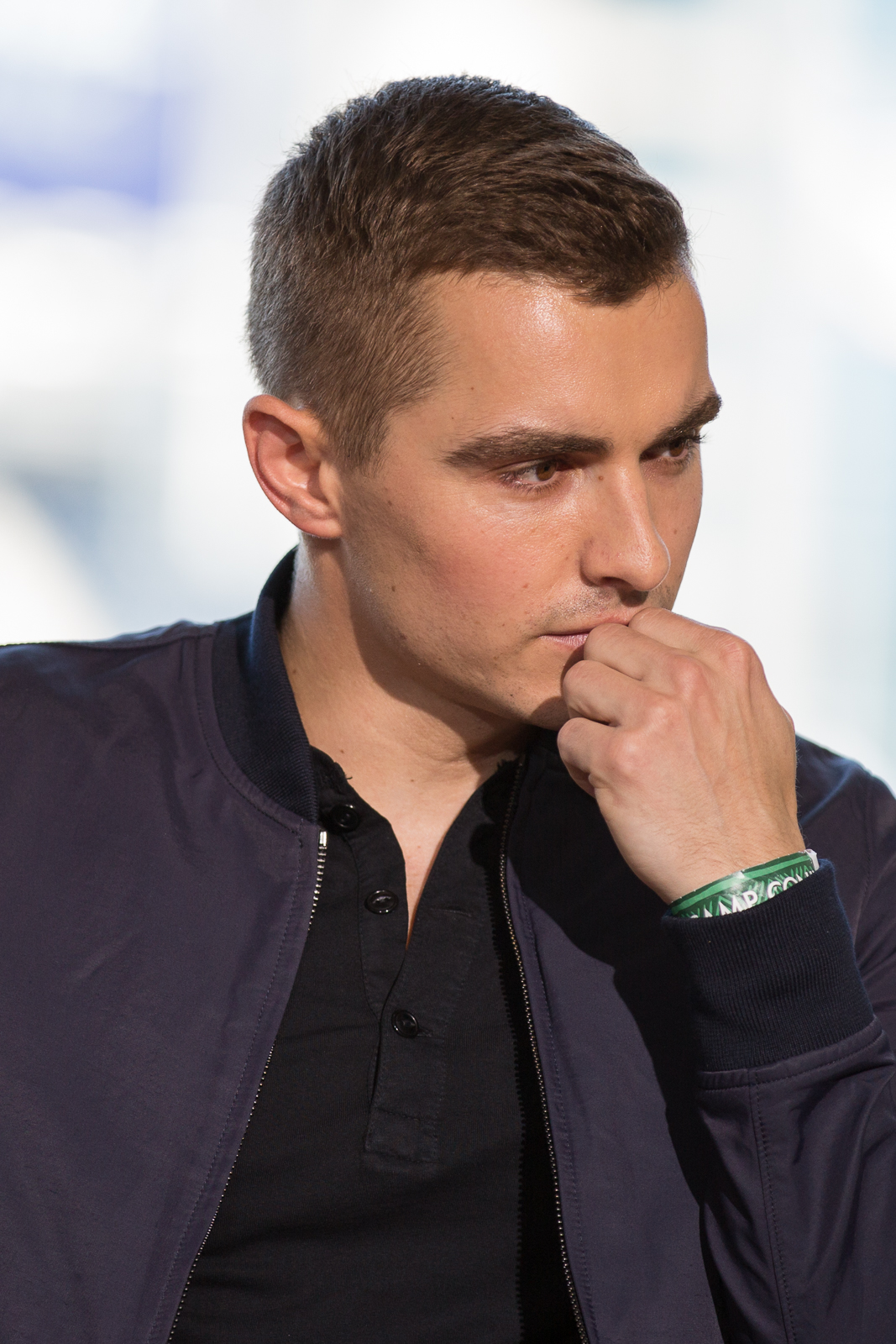 2016 Comic Con